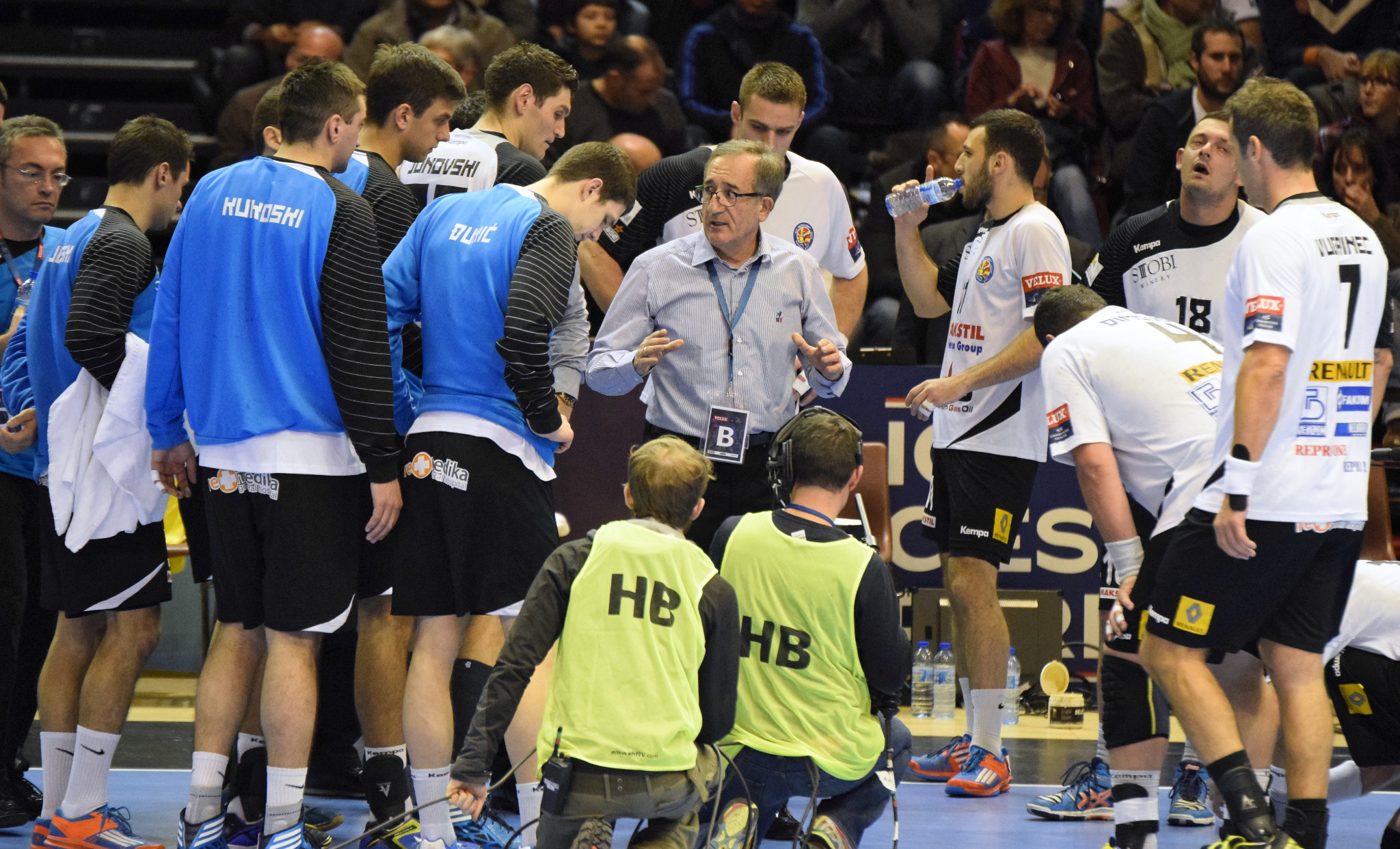 Rencontre de ligue des champions 2014-15 entre le PSG et Metalurg. A la Halle Carpentier (Paris), le 30 novembre 2014.